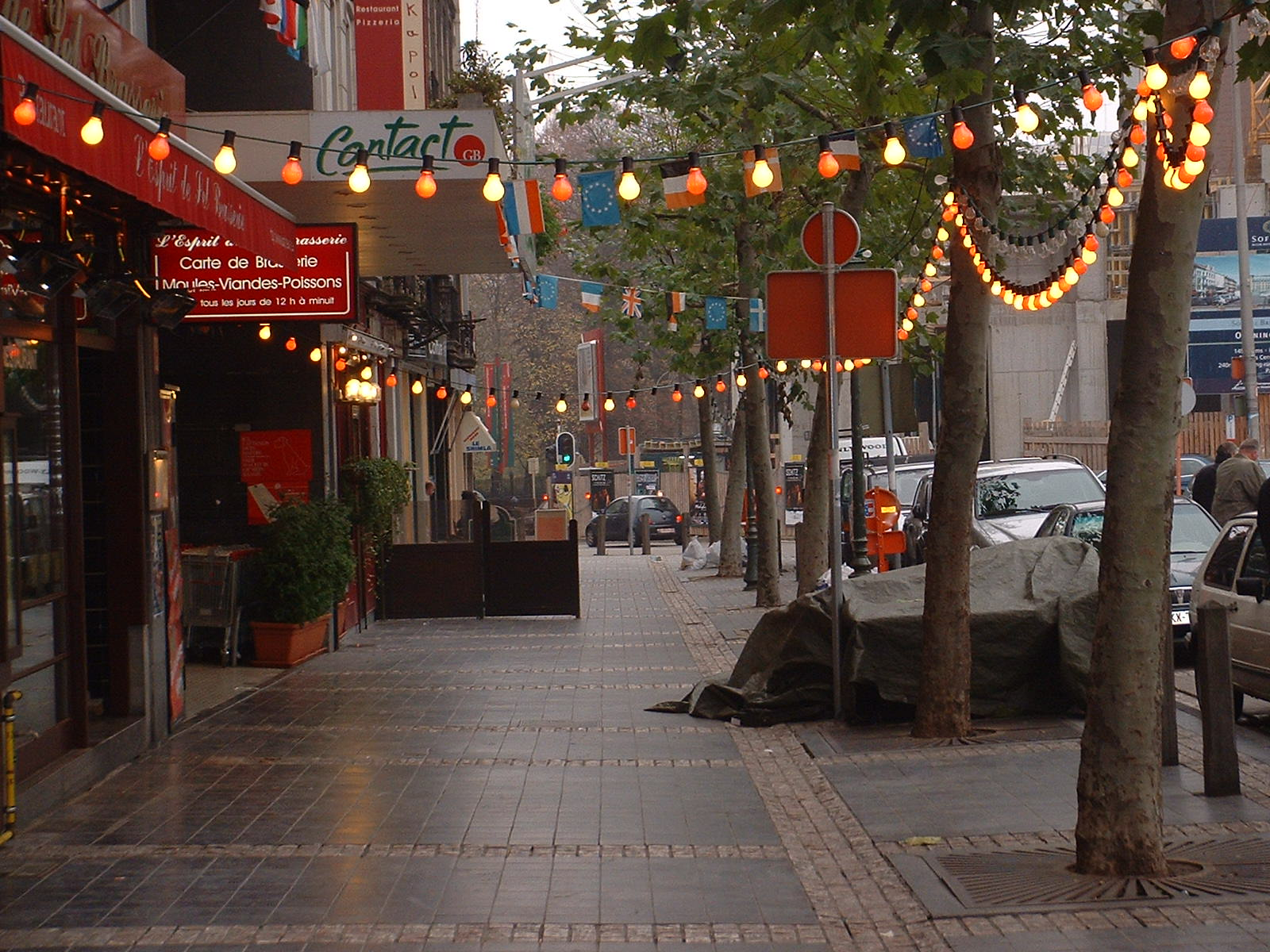 Place Jourdan Nr. 1